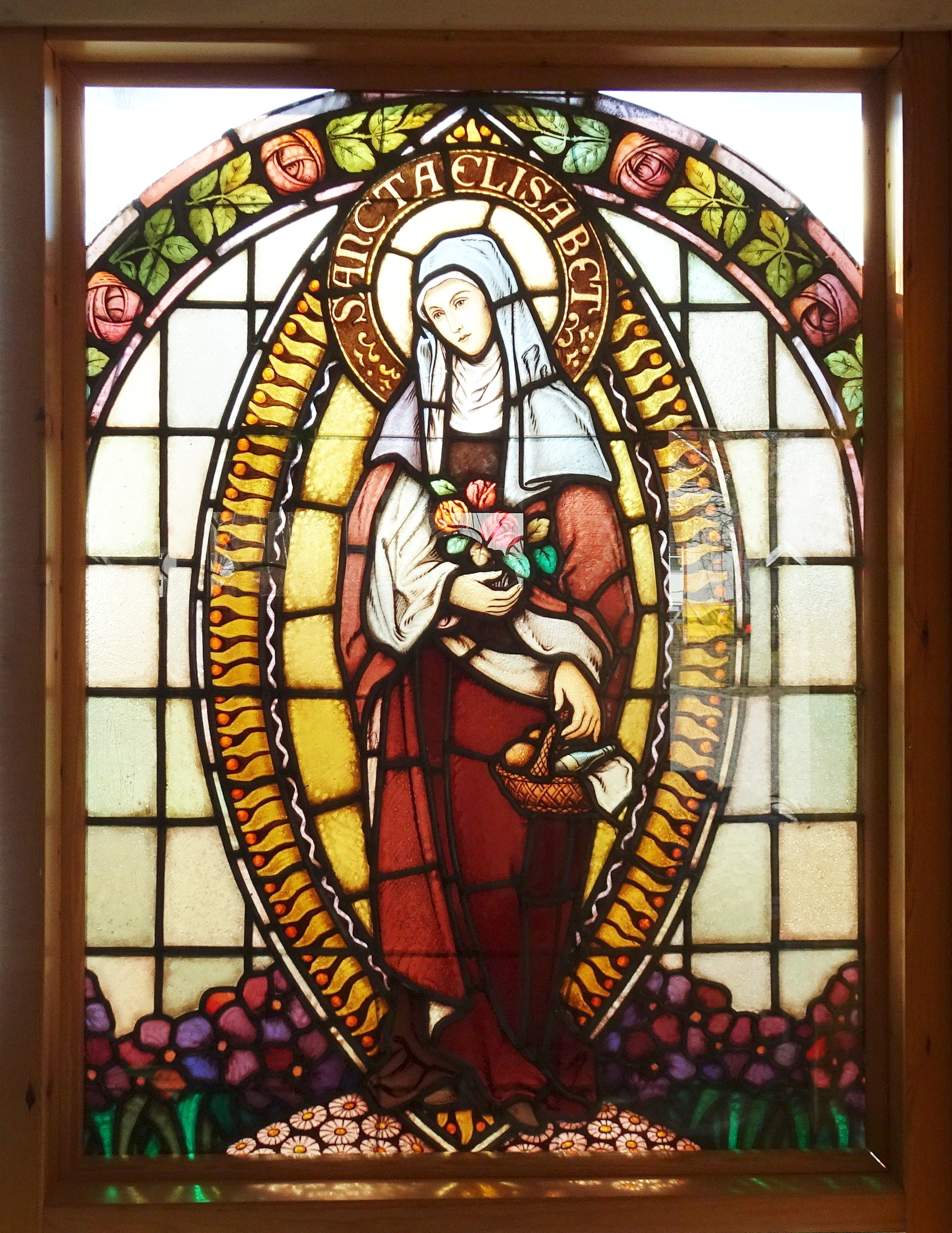 Sancta Elisabeths Systrars kapell i Stäket, arkitekt Erik Stark (1956)